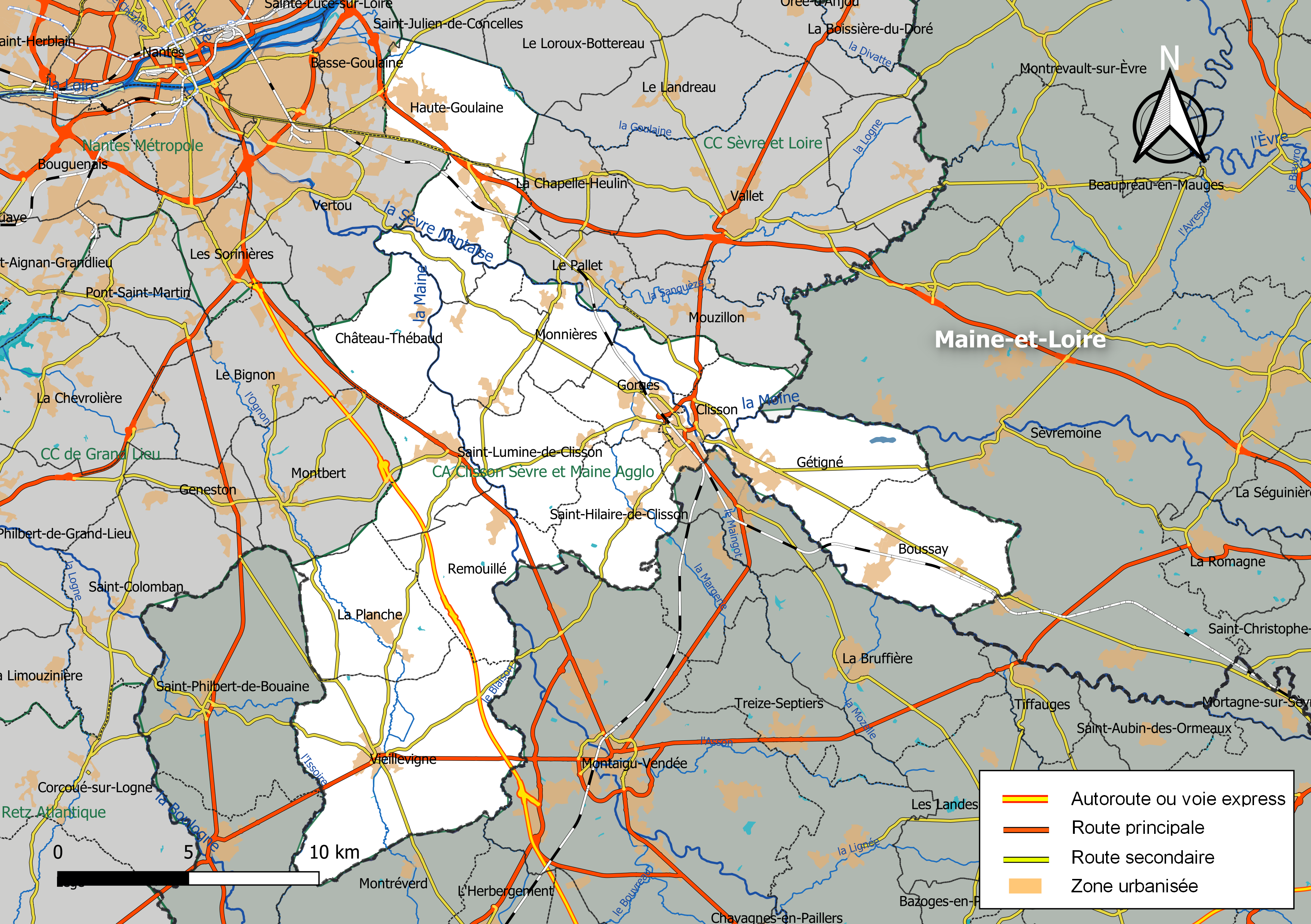 Carte géographique de l'intercommunalité Clisson Sèvre et Maine Agglo, département de la Loire-Atlantique, France. Composition au 1er janvier 2019.